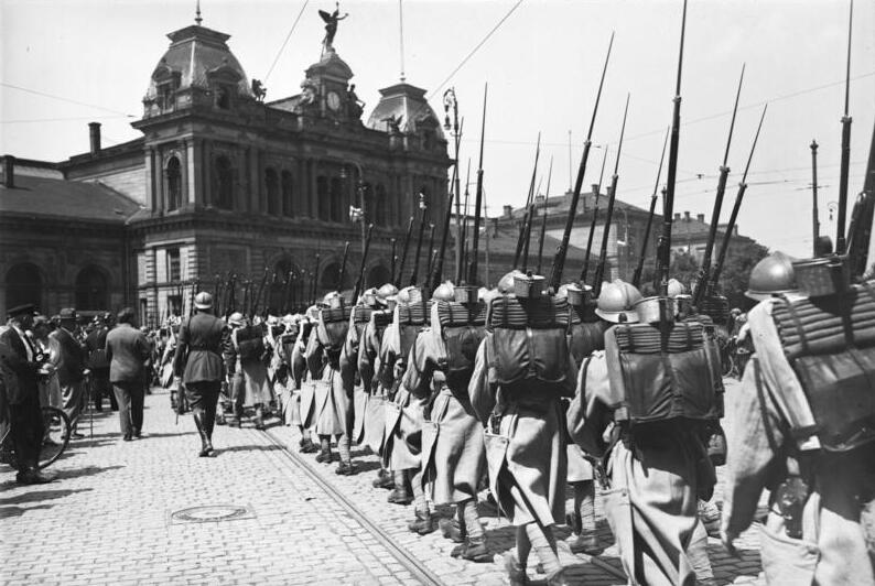 Das Rheinland ist frei! Der Abzug der letzten Franzosen aus Mainz! Die letzten Truppen verlassen Mainz. Im Hintergrund der Hauptbahnhof.